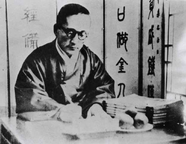 1946년의 춘원 이광수